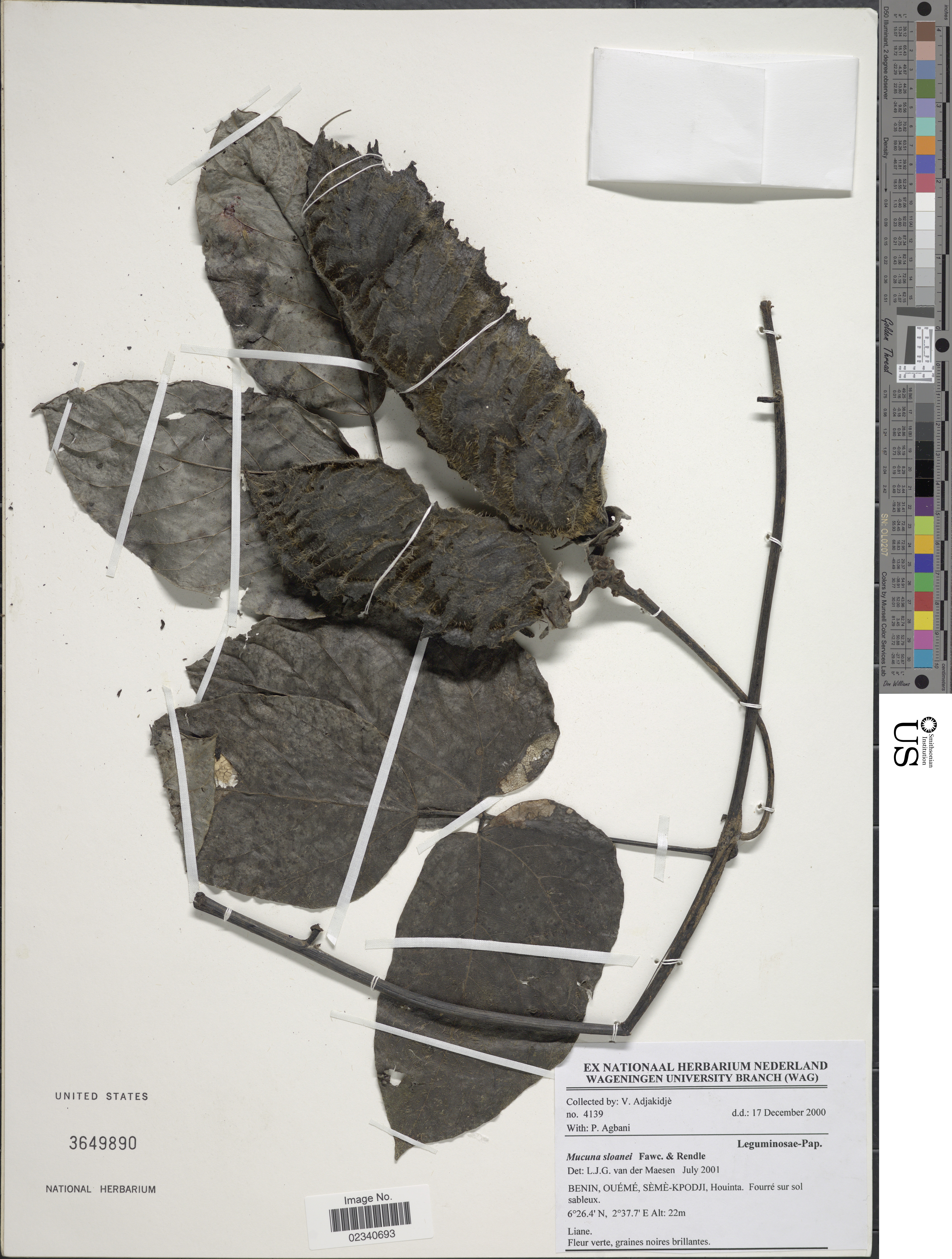 Mucuna sloanei Fawc. & Rendle Object Details Biogeographical Region 22 - West Tropical Africa Collector V. Adjakidjè Min. Elevation 22 Record Last Modified 3 Nov 2017 Specimen Count 1 Collection Date 17 Dec 2000 Barcode 02340693 USNM Number 3649890 Place Benin, Oueme, Seme-Kpodji, Houinta, Fourre sur sol sableux., Oueme, Benin, Africa Published Name Mucuna sloanei Fawc. & Rendle Common name Au to'u Autou Papa Papa nui aohe Tafifi tatramoa Taxonomy Plantae Dicotyledonae Rosales Fabaceae Faboideae NMNH - Botany Dept. Record ID nmnhbotany_13641567 Usage of Metadata (Object Detail Text) CC0 GUID (Link to Original Record)